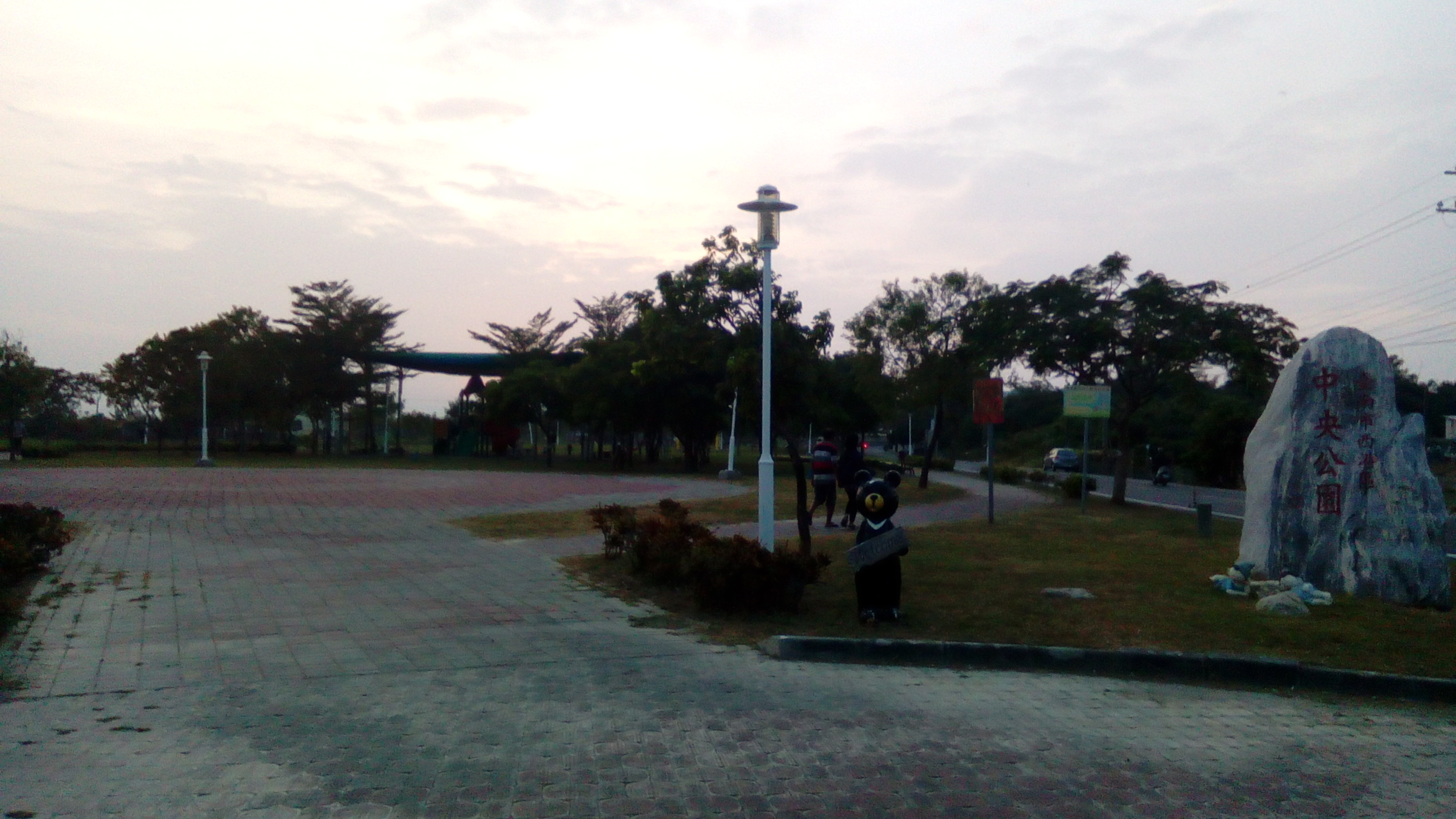 位於西港市區 全聯旁